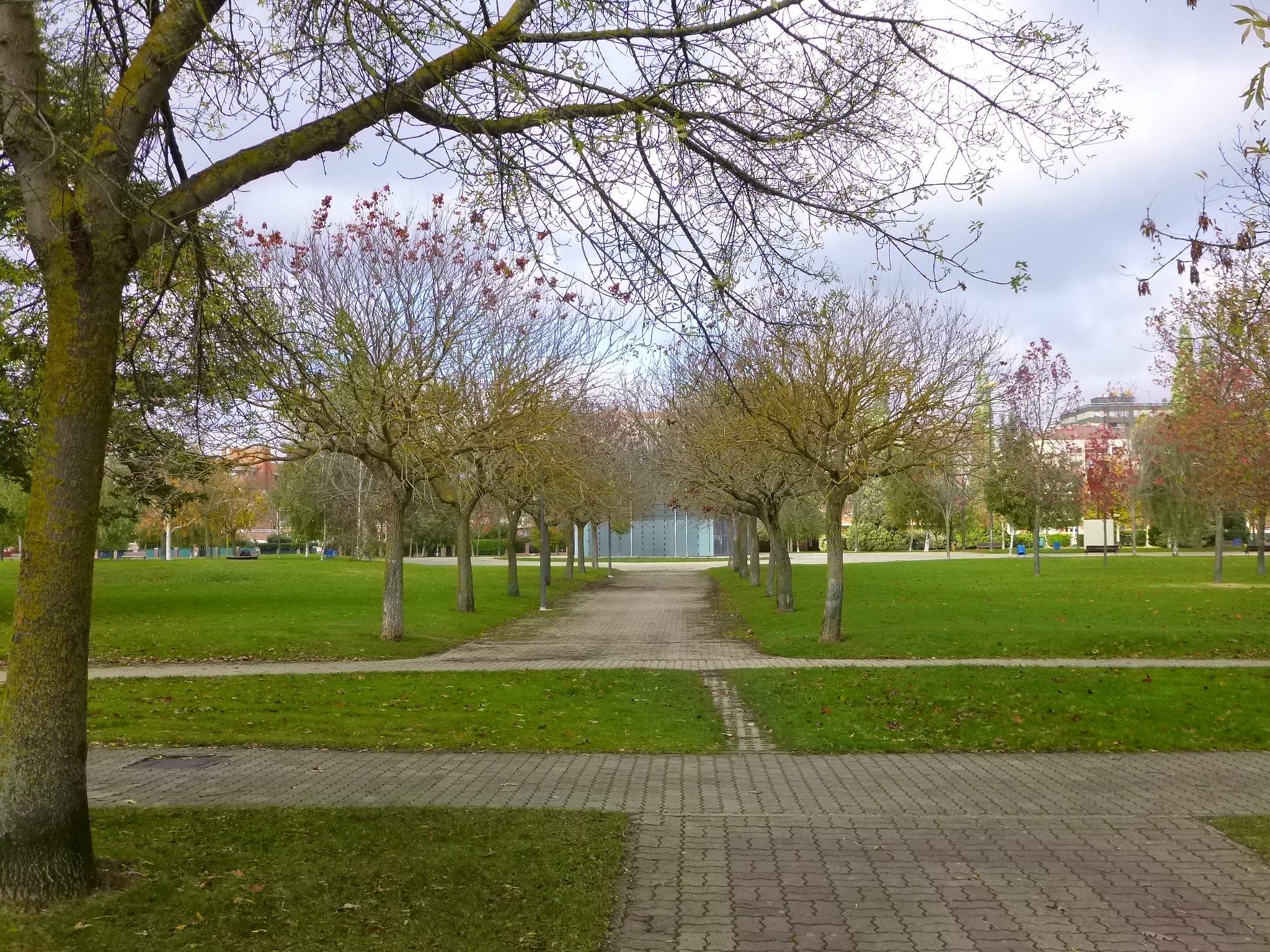 Parque de la Constitución (Barañain, Navarra)